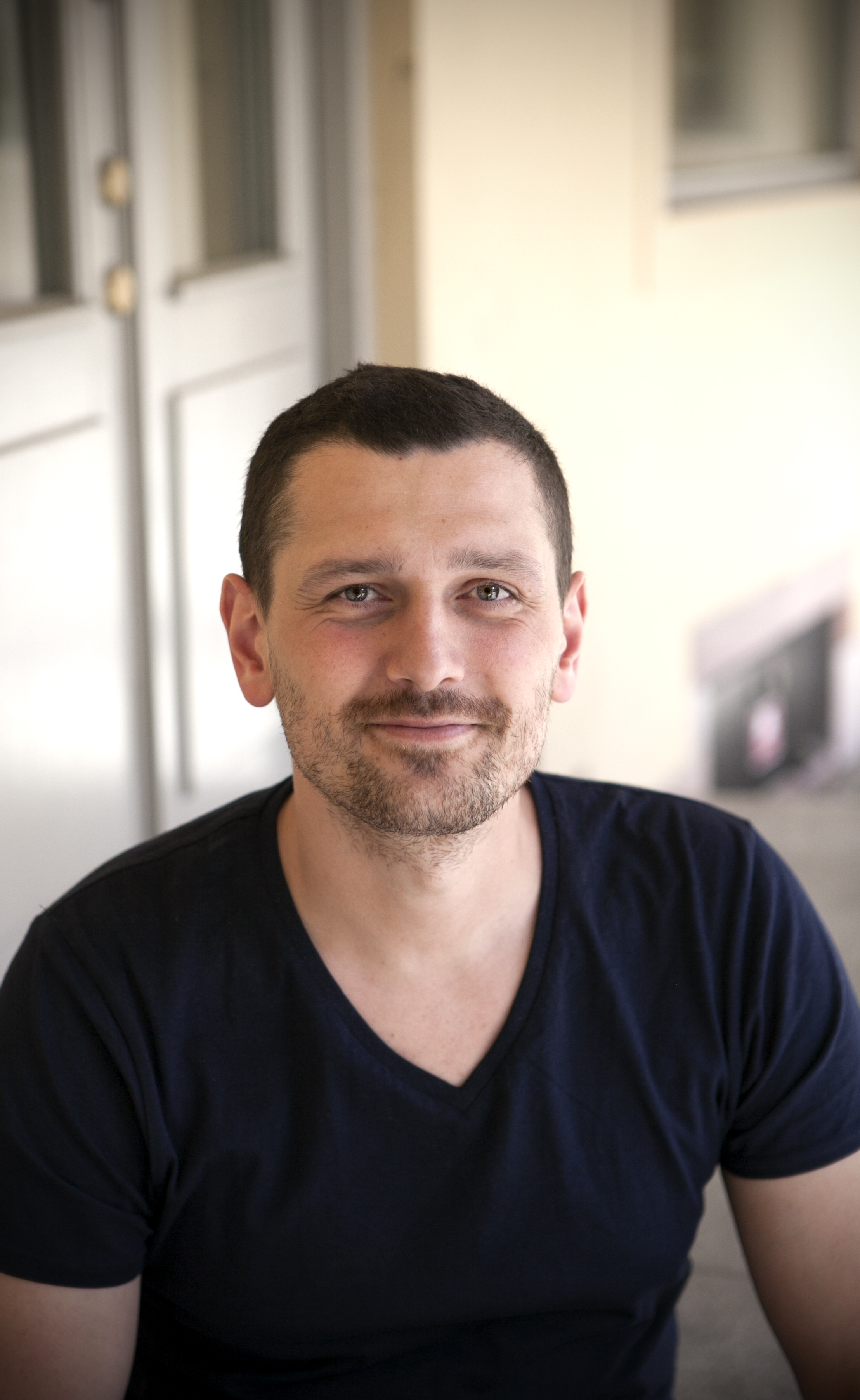 Adnan Dibrani är riksdagsledamot för Socialdemokraterna.